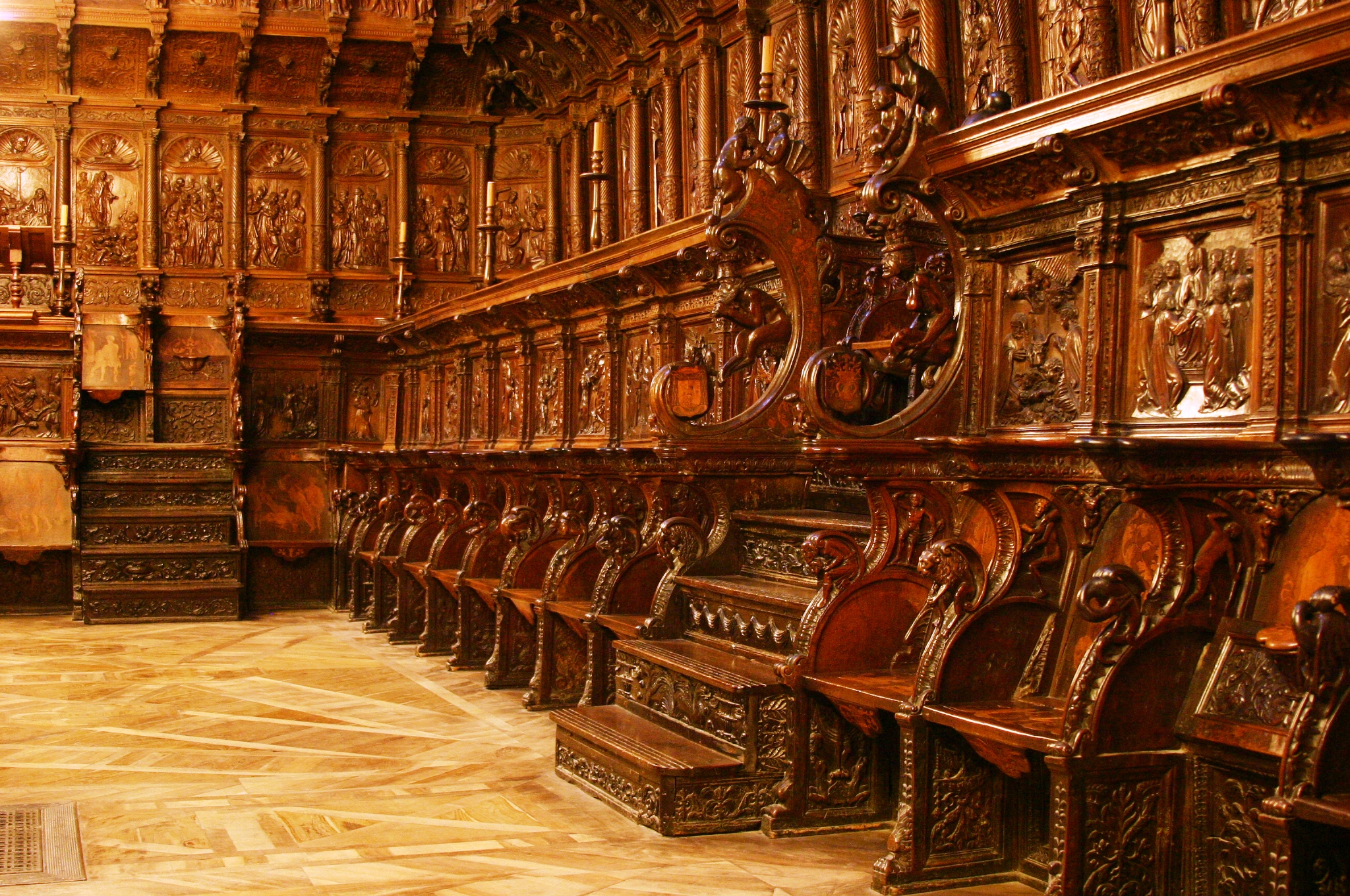 Interior da Catedral